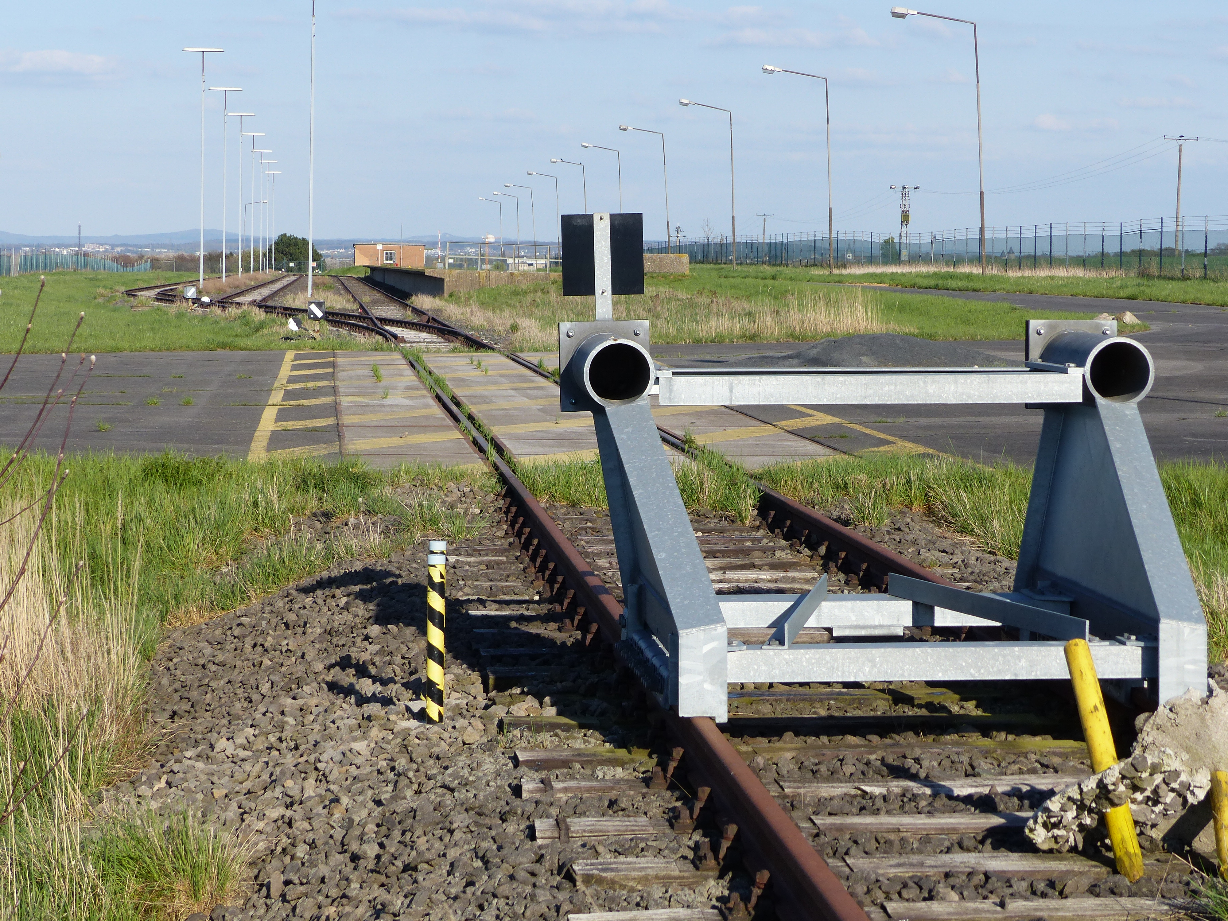 Umladestelle der Bundeswehr bei Oberdrees